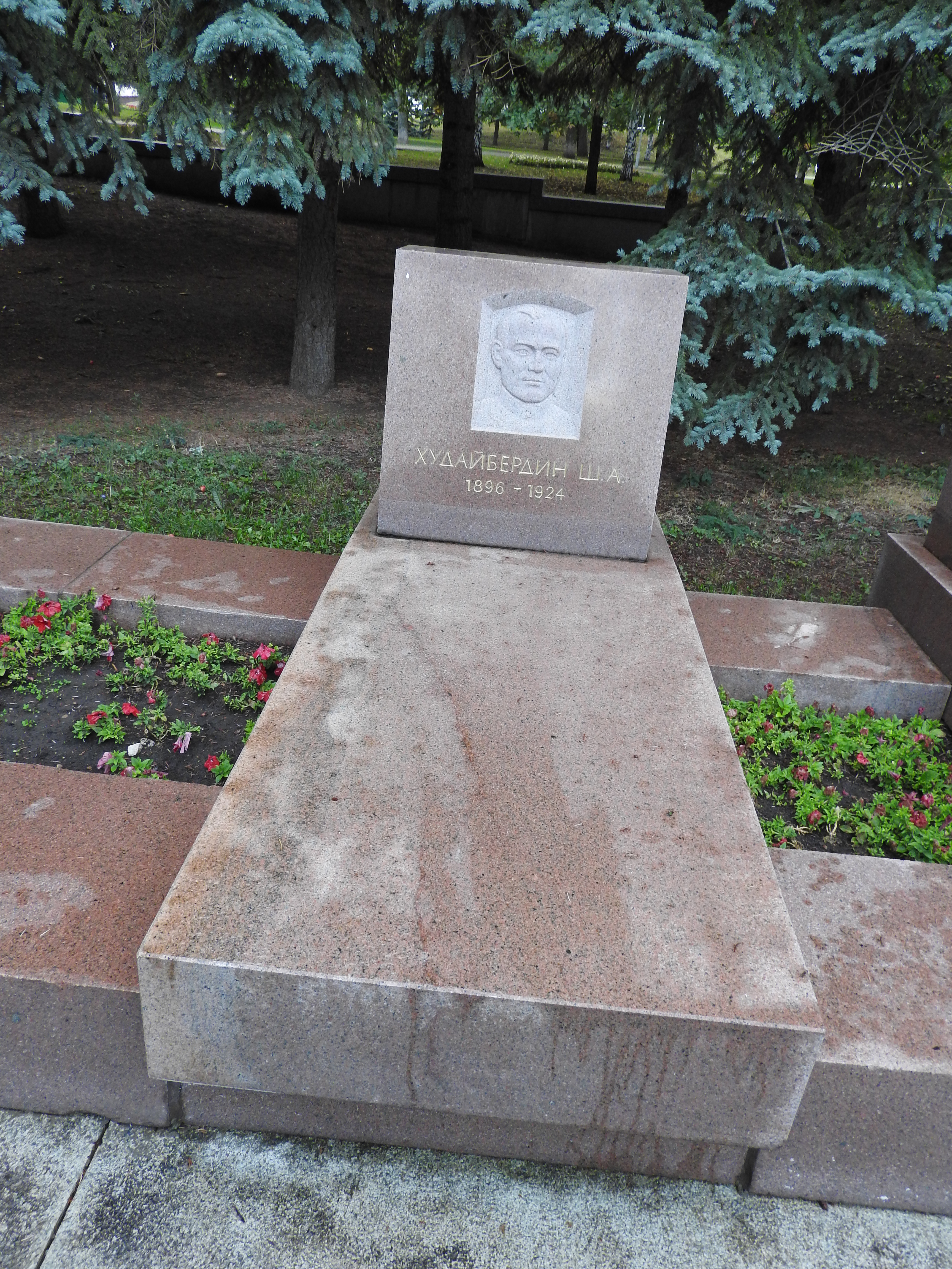 Парк Матросова в Уфе